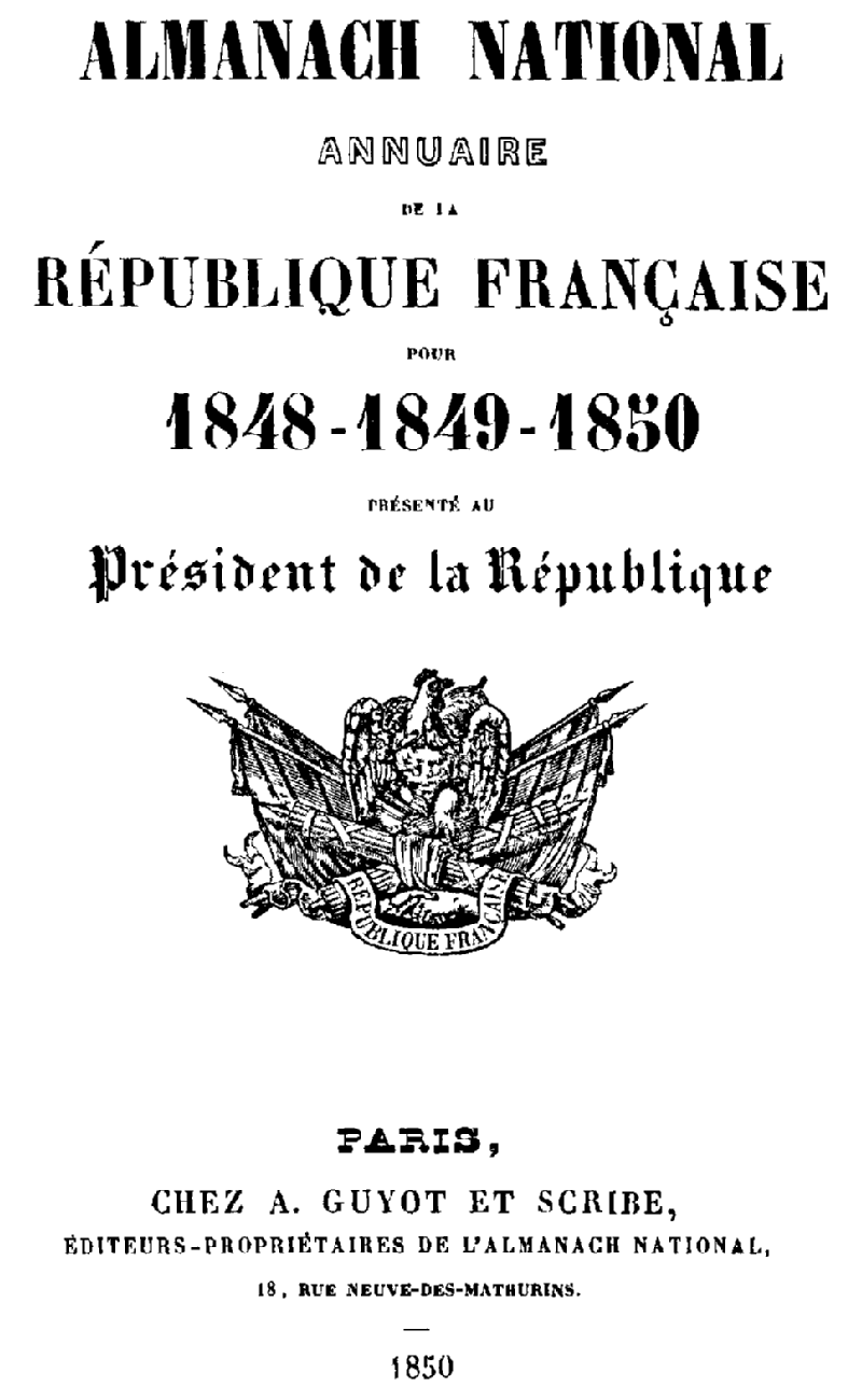 Abus d'effets typographiques sur la page de titre de l'Almanach national de 1850 édité et imprimé par Guyot & Scribe.